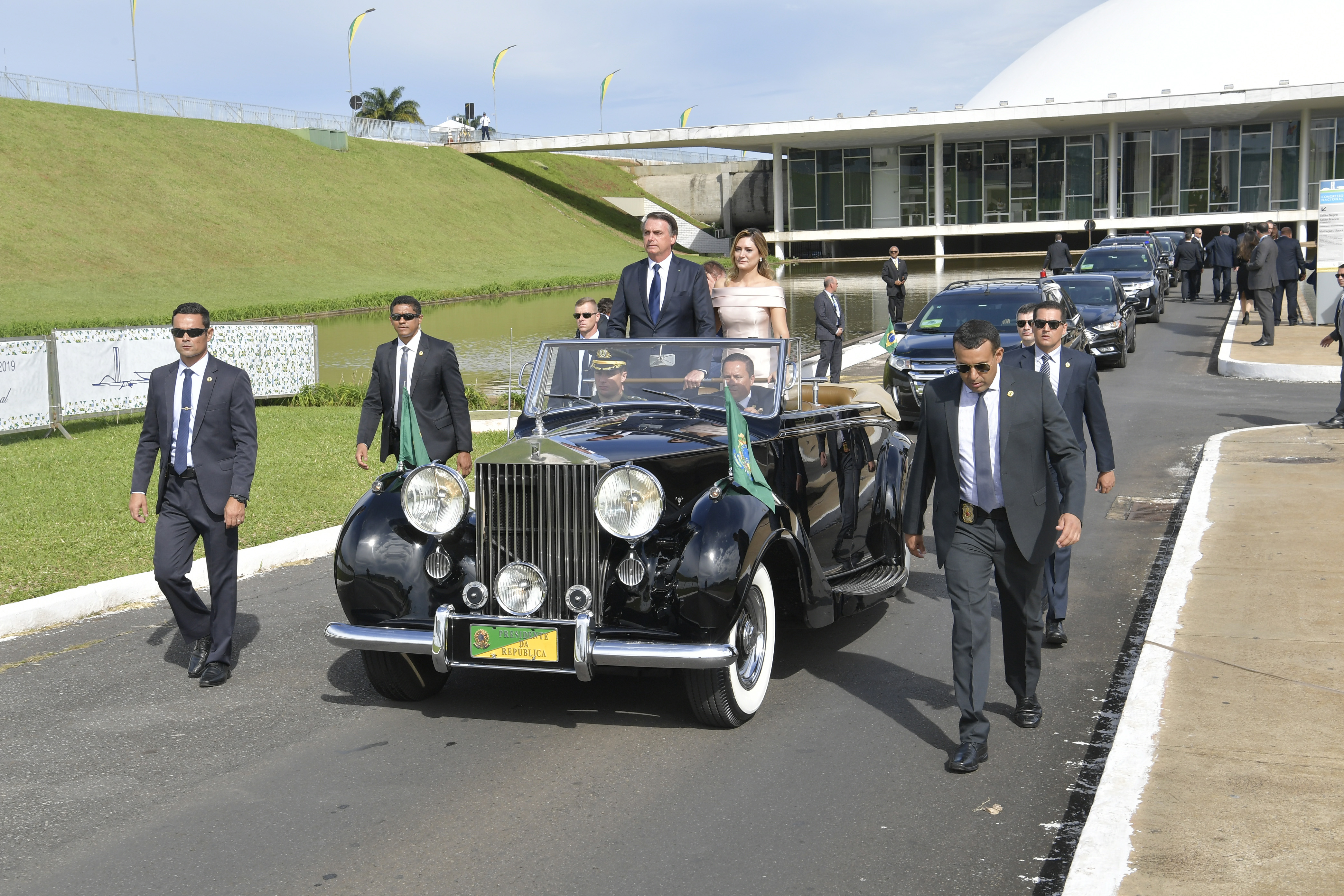 Solenidade - Após tomar posse, jurar cumprir a Constituição e discursar aos parlamentares, o presidente, Jair Bolsonaro sai do Congresso e segue cortejo até o Palácio do Planalto. Participam: Carlos Bolsonaro; primeira-dama, Michelle Bolsonaro. Foto: Marcos Brandão/Agência Senado